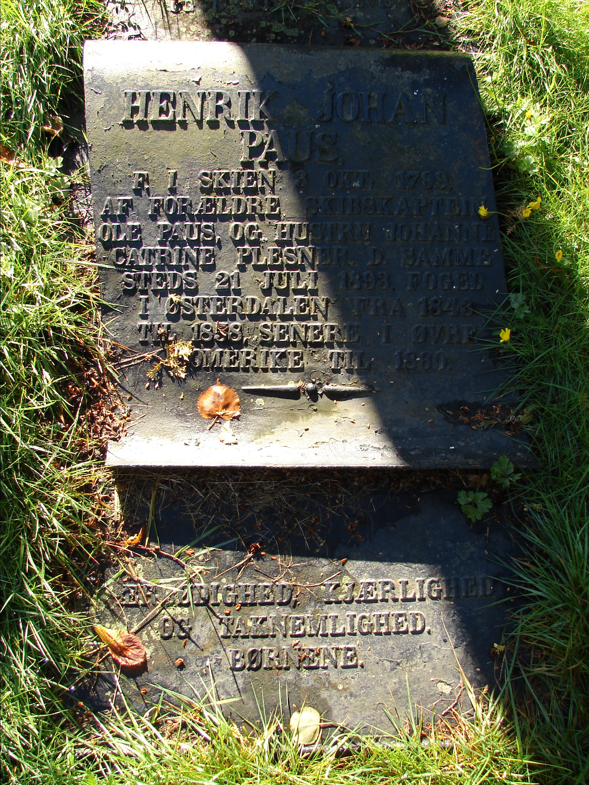 Henrik Johan, Paus, f. i Skien 3 Okt. 1799, af Forældre Skibskaptein Ole Paus, og Hustru Johanne Catrine Plesner. D. samme steds 21 Juli 1893. Foged, i Østerdalen fra 1843, til 1858, senere i Øvre Romerike til 1860.Ærbødighed, Kjærlighed, og Taknemlighed. Børnene. Gravminde på Lie kirkegård i Skien.